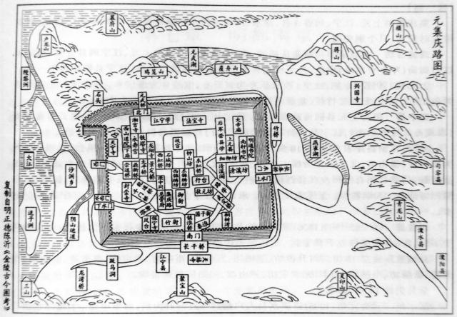 ，集庆路地图，复制自明朝陈沂所著《金陵古今图考》。